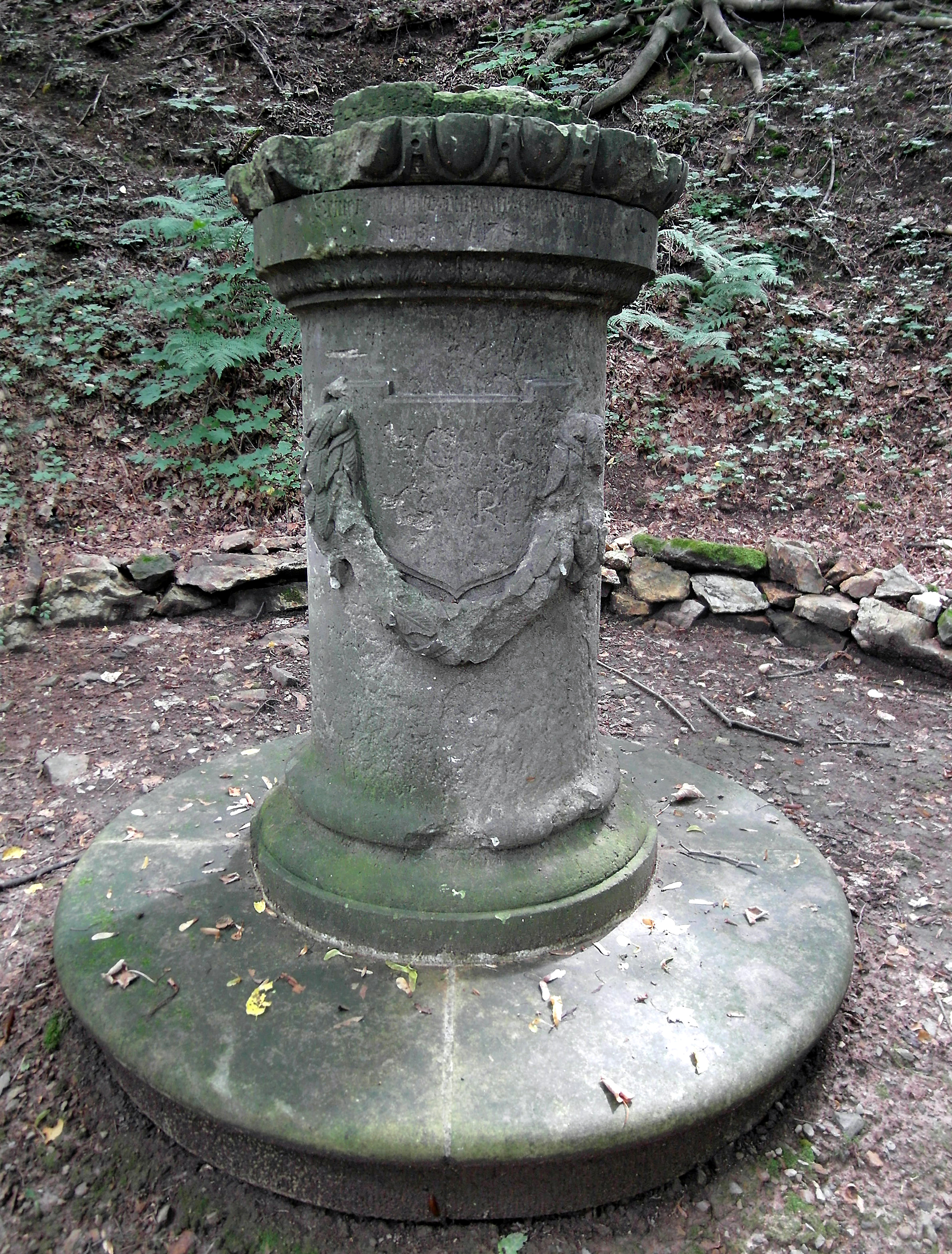 09.08.2014 01809 Röhrsdorf: Schloßpark Röhrsdorf im Kerbtal des Rietzschke-Baches (GMP: 50.959224,13.798957). Postament süöstlich der Rietzschke am Hang. [SAM5287.JPG]20140809155DR.JPG(c)Blobelt